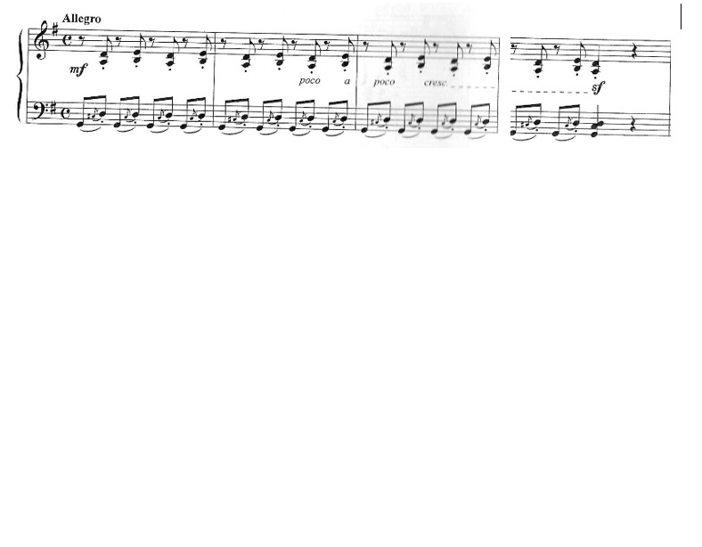 Друга п'єса фортепіанного циклу "Калейдоскоп настроїв"